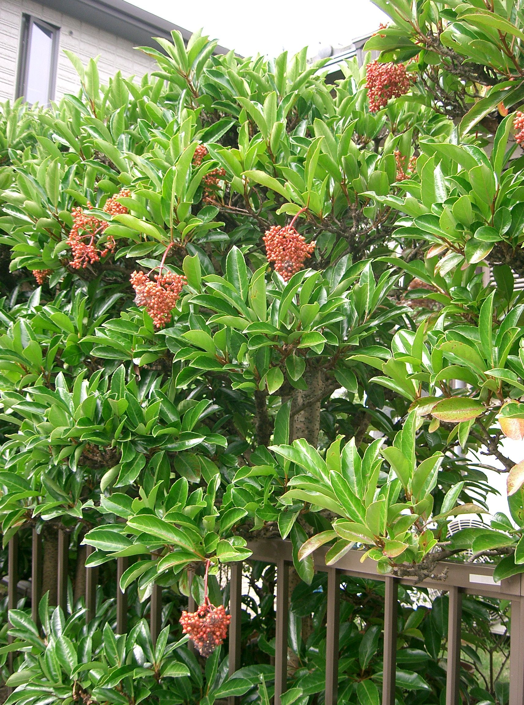 Viburnum odoratissimum var. awabuki（synonym: V. awabuki)